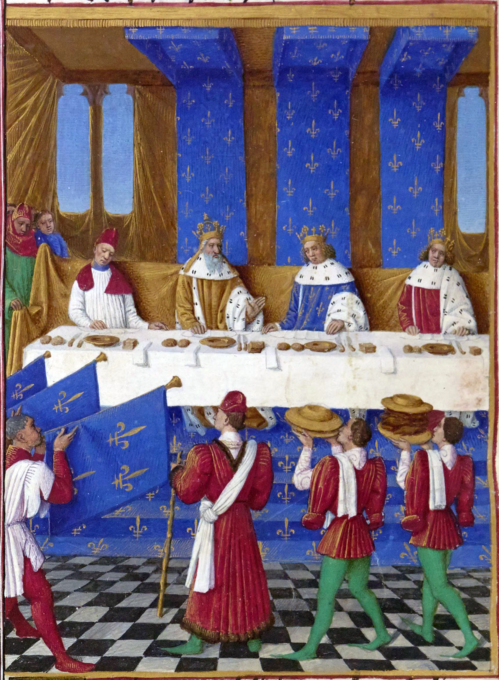 Banquet de Charles V le Sage Grandes Chroniques de France, enluminées par Jean Fouquet, Tours, vers 1455-1460 Paris, BnF, département des Manuscrits, Français 6465, fol. 444v. (Livre de Charles V) Le 6 janvier 1378, jour de la fête de l'Épiphanie, le roi Charles V le Sage donne un banquet en l'honneur de Charles IV, empereur de Bohême, et de son fils Wenceslas, roi des Romains. Le repas a lieu dans la grand salle du Palais en présence de la cour et d'une foule considérable de dignitaires. Cette œuvre fait partie du cycle de peintures exécuté par Jean Fouquet vers 1460 pour illustrer un exemplaire des Grandes Chroniques de France, probablement destiné au roi Charles VII. Elle clôt le récit de la visite que le roi de France, Charles V († 1380), reçut de son oncle maternel, l'empereur Charles IV de Bohême († nov. 1378) qui vint en France, au cours de l'hiver 1377-1378, accompagné de son fils aîné, le prince Wenceslas, comte de Luxembourg et roi des Romains.